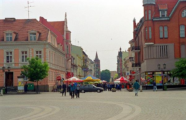 Rynek widok na ul. Bolesława Chrobrego